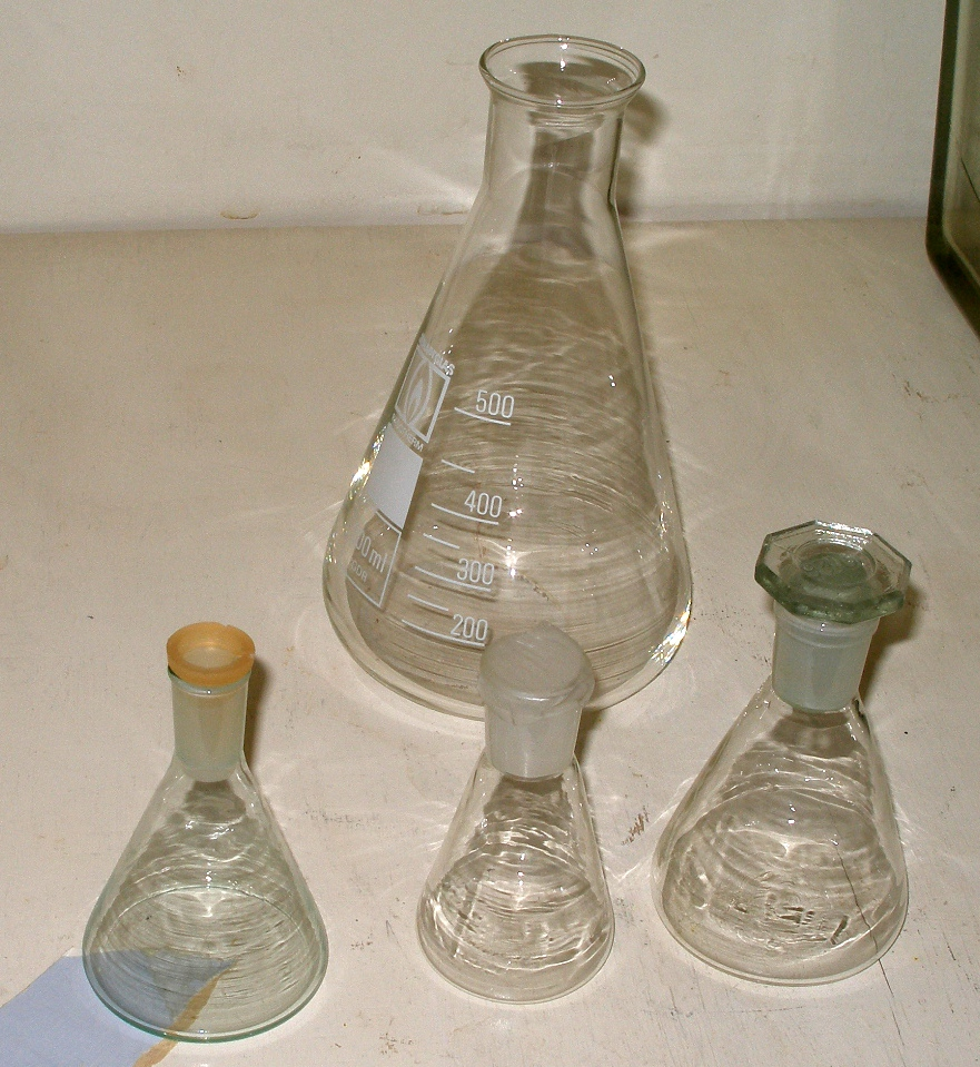 Dažādas koniskās kolbas.